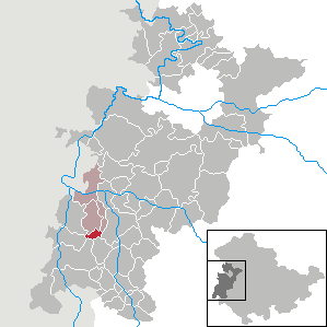 Wölferbütt in Thuringia - Wartburgkreis